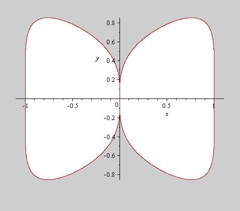 De algebraïsche vlindercurve.